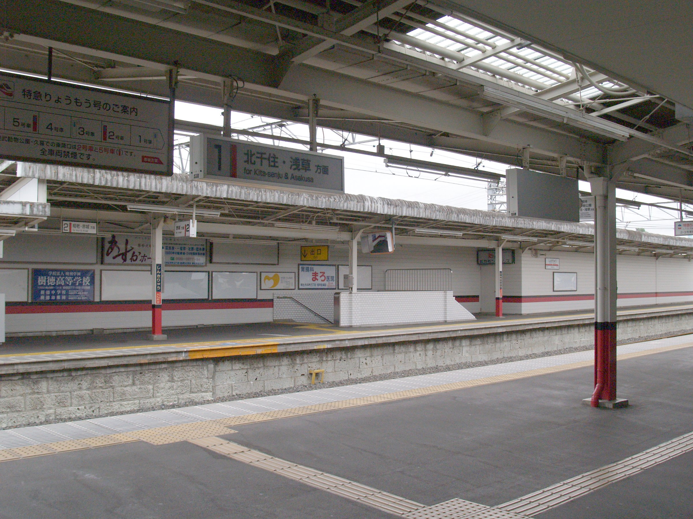 新桐生駅ホーム